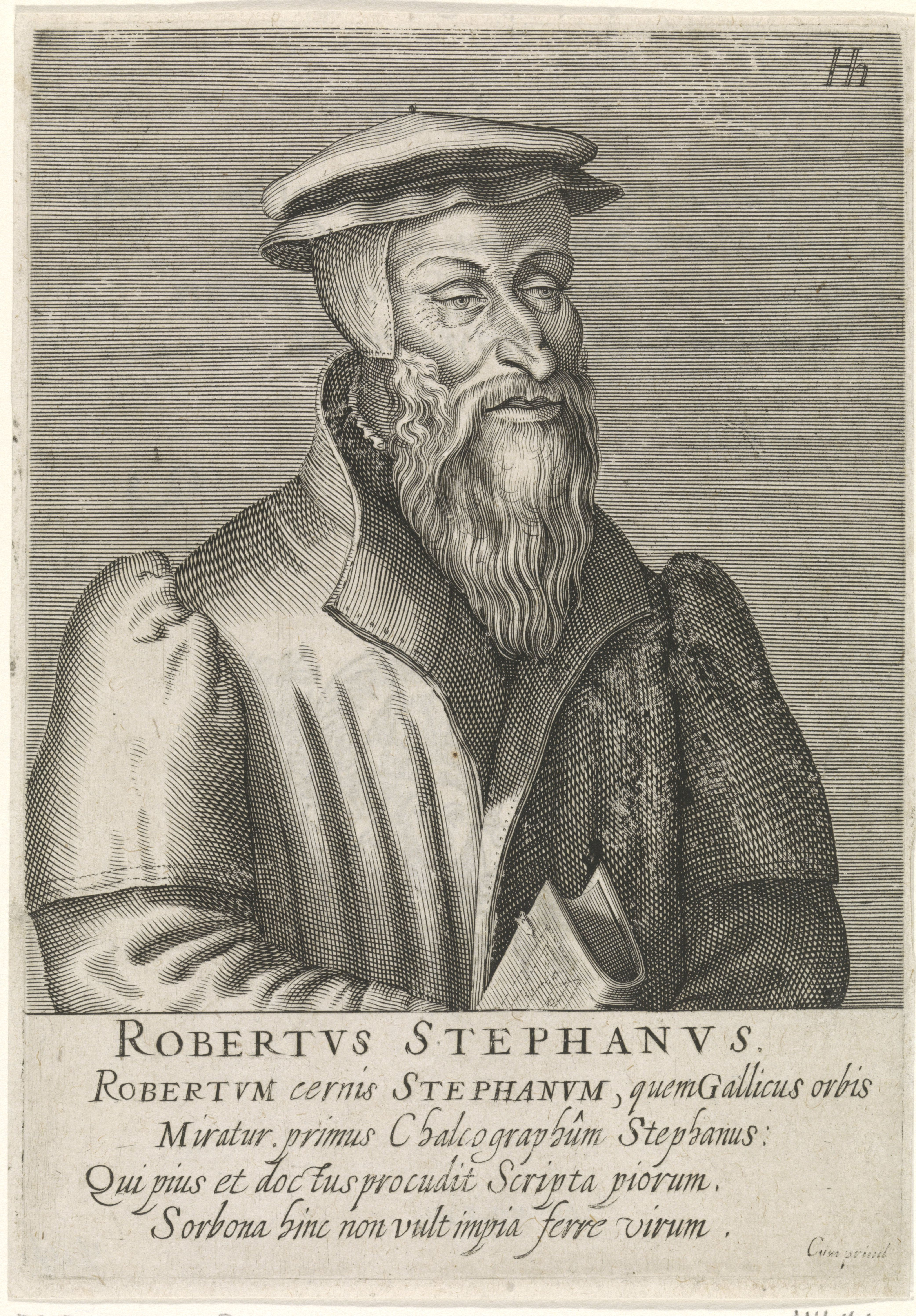 IdentificatieTitel(s): Portret van Robert I EstienneBeroemde hervormers (serietitel)Icones virorum nostra patrumq. memoria illustrium (serietitel)Objecttype: prent boekillustratie Objectnummer: RP-P-OB-55.218Catalogusreferentie: New Hollstein Dutch 173-1(2)Hollstein Dutch 159Omschrijving: Buste naar rechts van Robert I Estienne. Onder het portret zijn naam en vier regels in het Latijn. Prent uit (deel 1 van) de serie portretten van beroemde hervormers.VervaardigingVervaardiger: prentmaker: Hendrick Hondius (I) (vermeld op object)verlener van privilege: Staten-Generaal (vermeld op object)Plaats vervaardiging: Den HaagDatering: 1599Fysieke kenmerken: gravure; boekdruk versoMateriaal: papier Techniek: graveren (drukprocedé) / boekdrukAfmetingen: plaatrand: h 166 mm × b 117 mmToelichtingPrent ook gebruikt als boekillustratie in: Jacob Verheiden, Præstantium aliquot theologorum, qui rom. antichristum præcipuè oppugnarunt, effigies. Den Haag: Hendrick Hondius I en Den Haag: B.C. Nieulandt, 1602-1603. Tevens: Arnhem, J.Janssen, 1604.OnderwerpWie: Robert I EstienneVerwerving en rechtenVerwerving: onbekendCopyright: Publiek domein